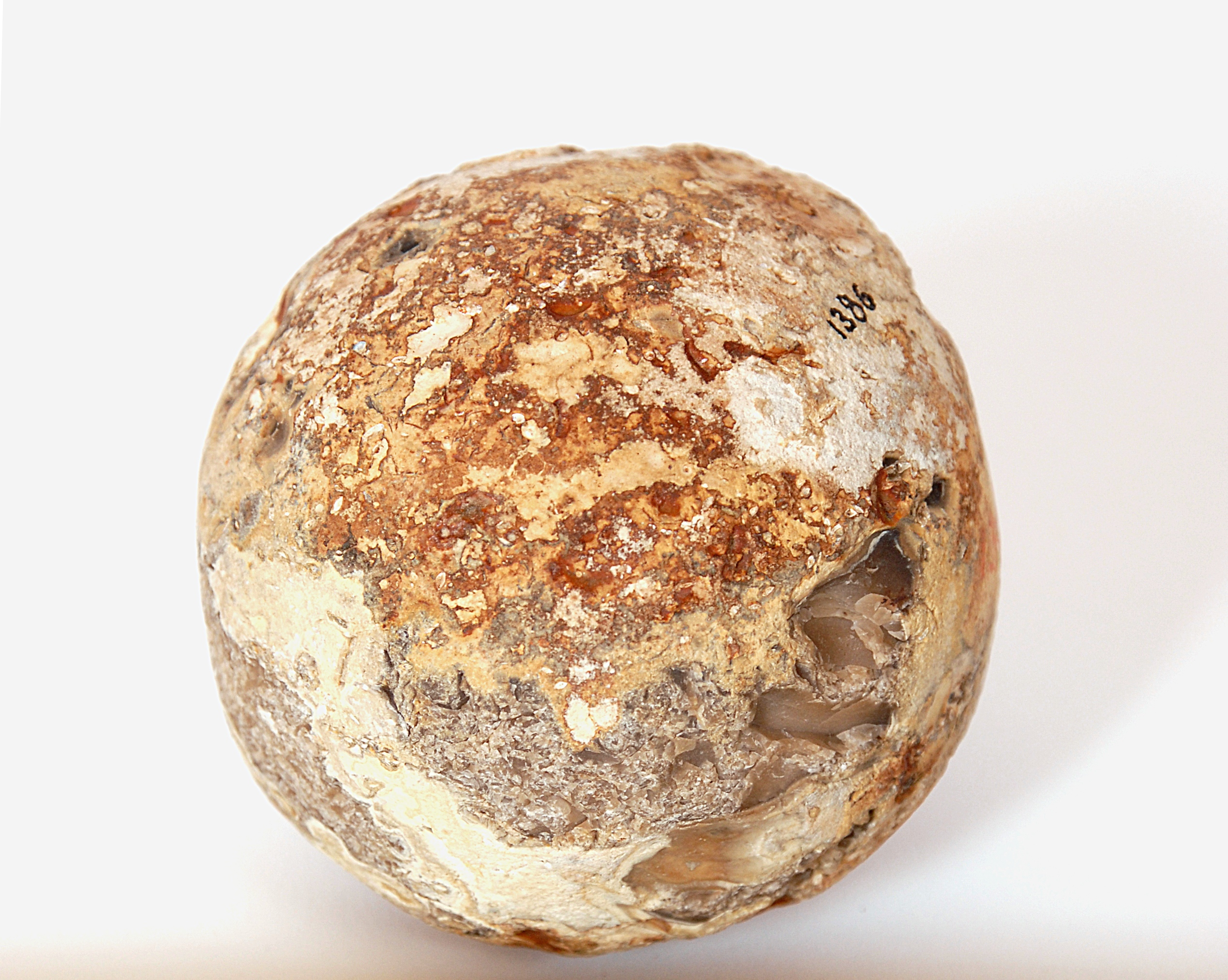 Bola de piedra, redondeada, usada cómo proyectil de mandro. Descubierta entre las ruinas del Templo de Eleuthya, siendo posible su pertenencia a la arqueología egipcia, con posible relación con los pueblos de Blemis de Etiopía.